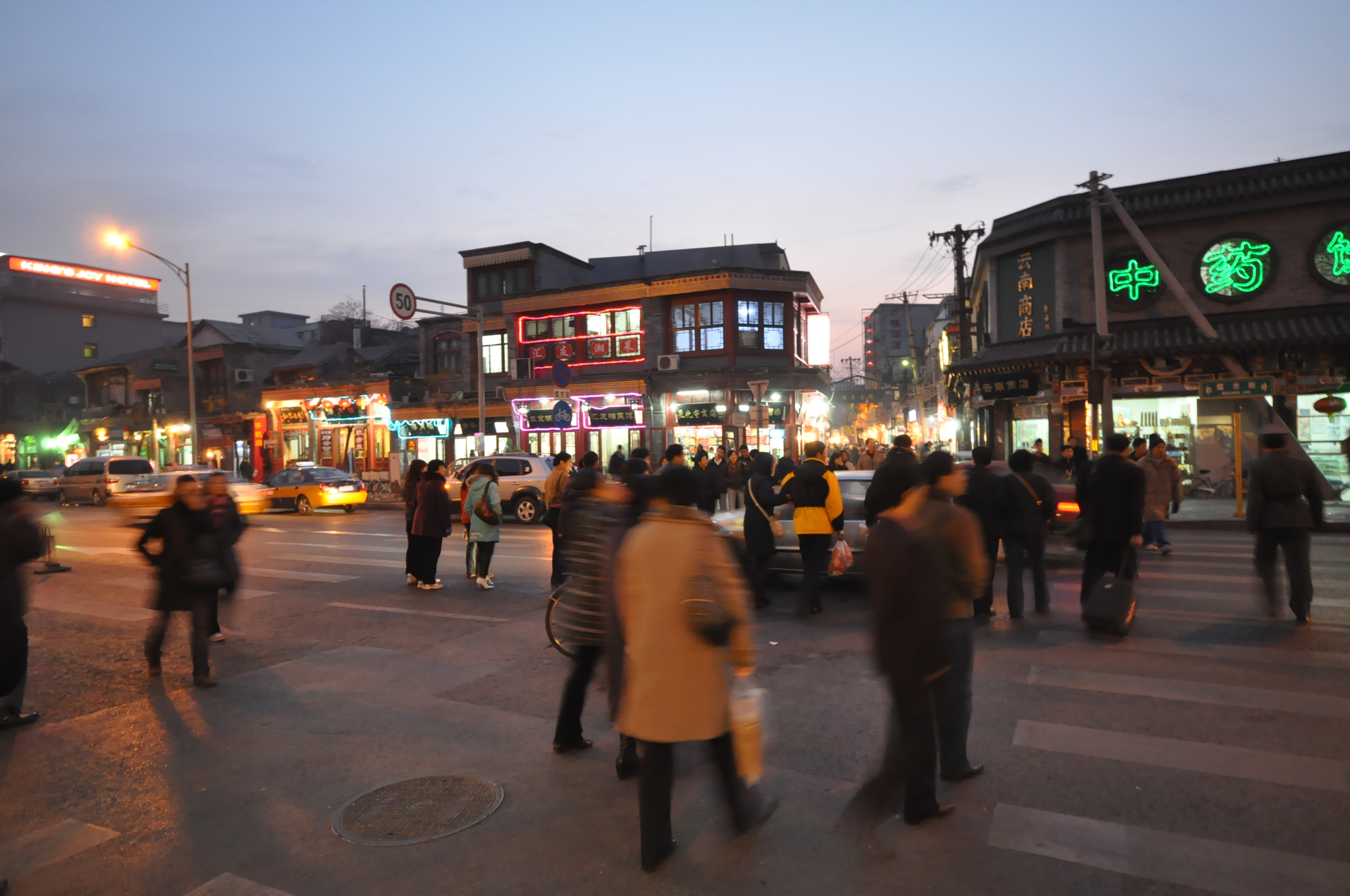 Unidentified street - Beijing 大栅栏西街东口，大栅栏西街与煤市街交叉路口